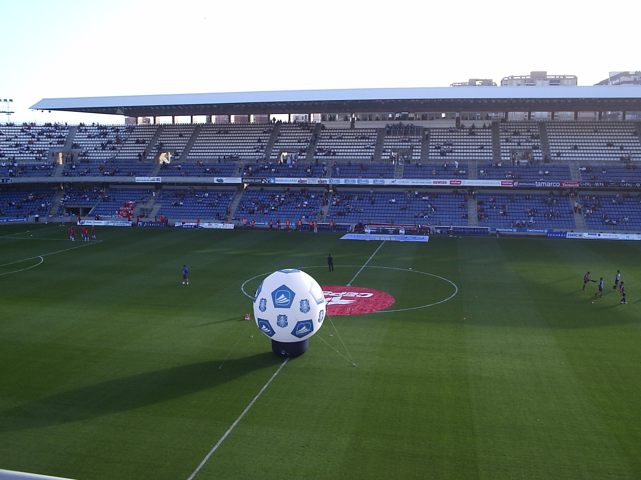 Estadio Rodríguez López. Tenerife - Real Sociedad 08/09.